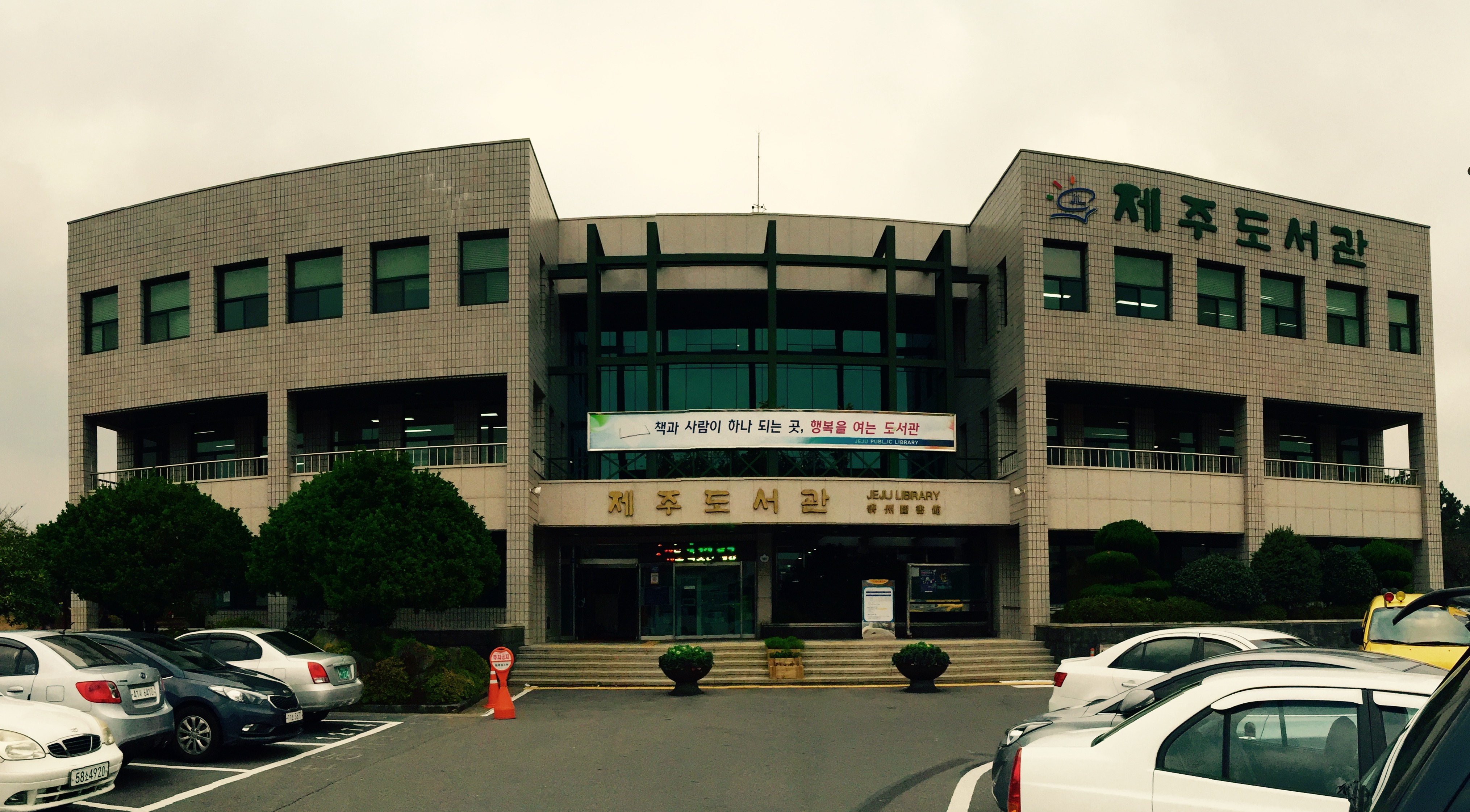 대한민국 제주특별자치도 제주시 제주도서관